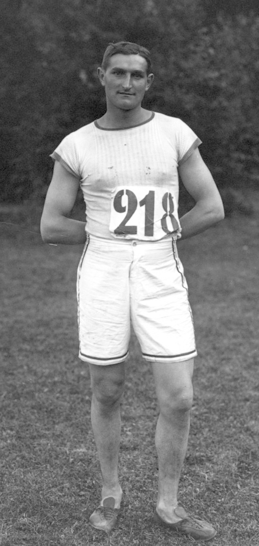 17-8-13, championnats militaires [de France d'athlétisme], Pierre [gagnant du lander du] disque : [photographie de presse] / [Agence Rol]